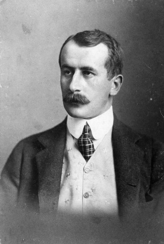 Alois Fürst zu Löwenstein Wertheim Rosenberg, Reichstagsabgeordneter, Zentrum, Wahlkreis Daun-Prüm-Bitburg Diese Photographie J.-C. Nr. 500 12 ist mit dem Recht der freien Verfügung erworben von Alois Fürst zu Löwenstein. siehe Revers vom 9.I.12 Nr.109